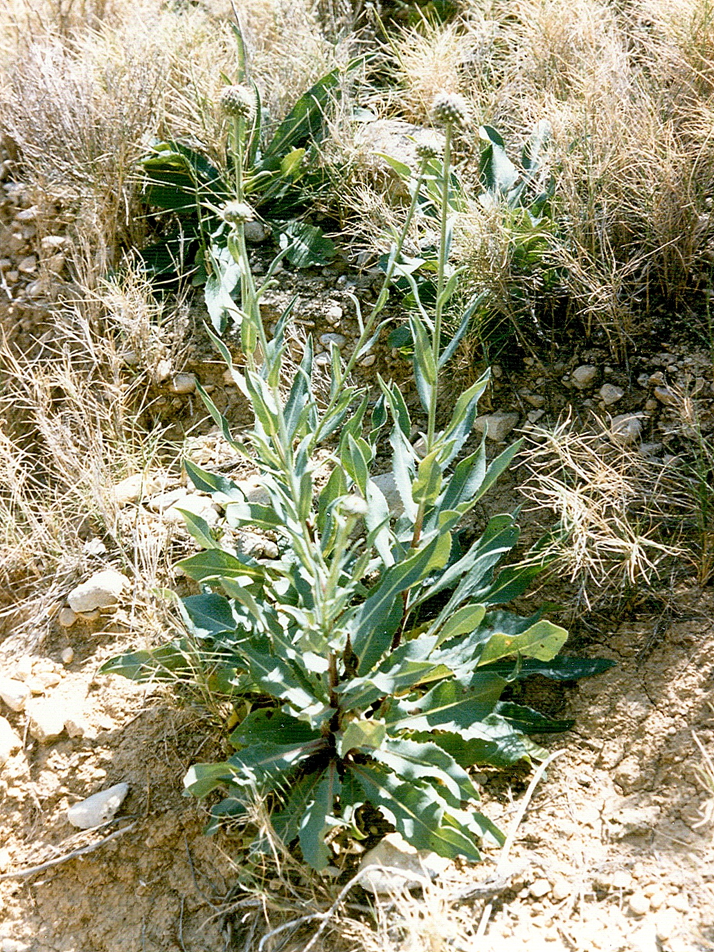 Klasea flavescens - Vista general - La algüeda, Albatera (Alicante, España).